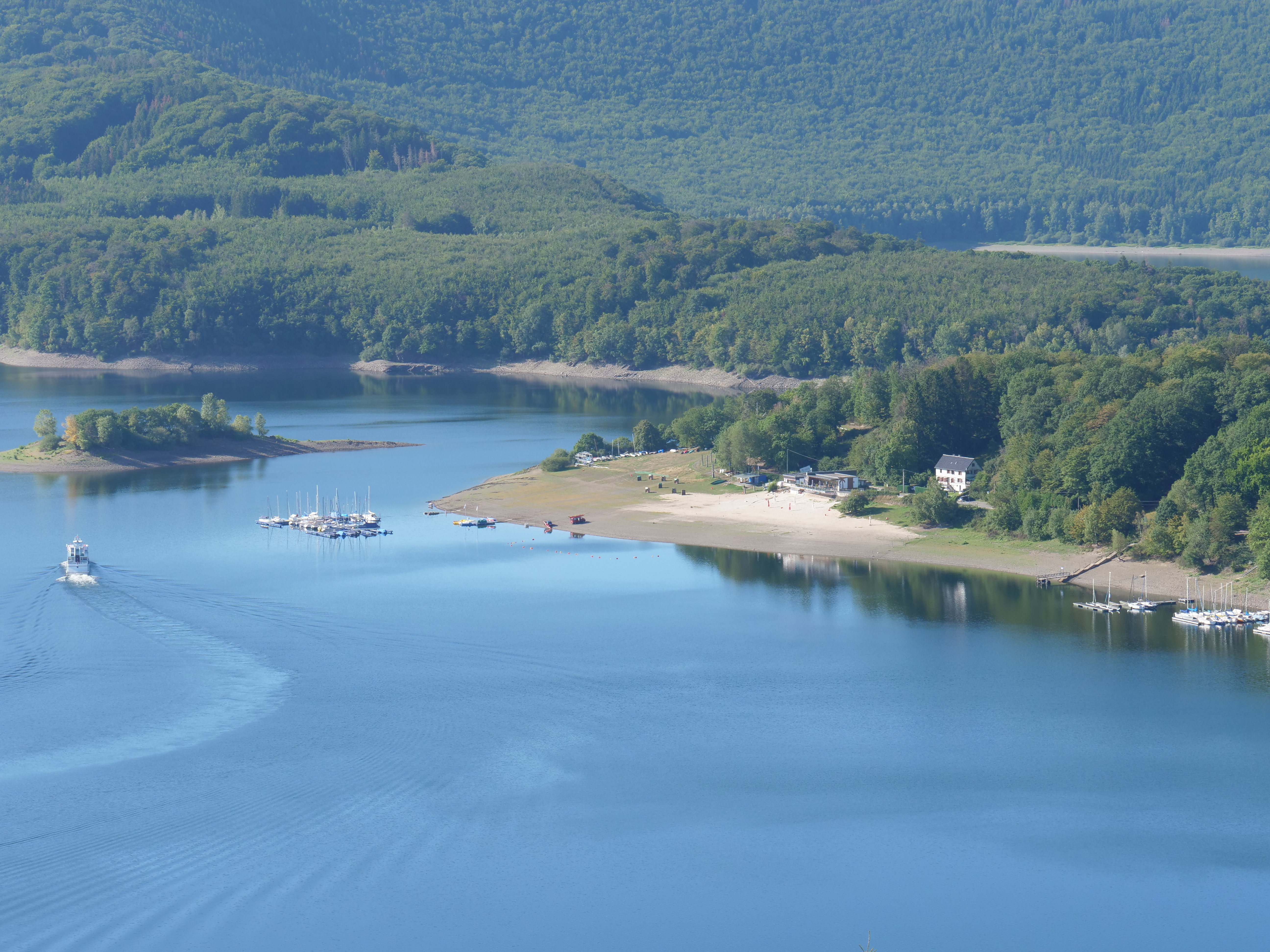 Die Rurtalsperre vom Aussichtspunkt Schöne Aussicht Schmidt aus.